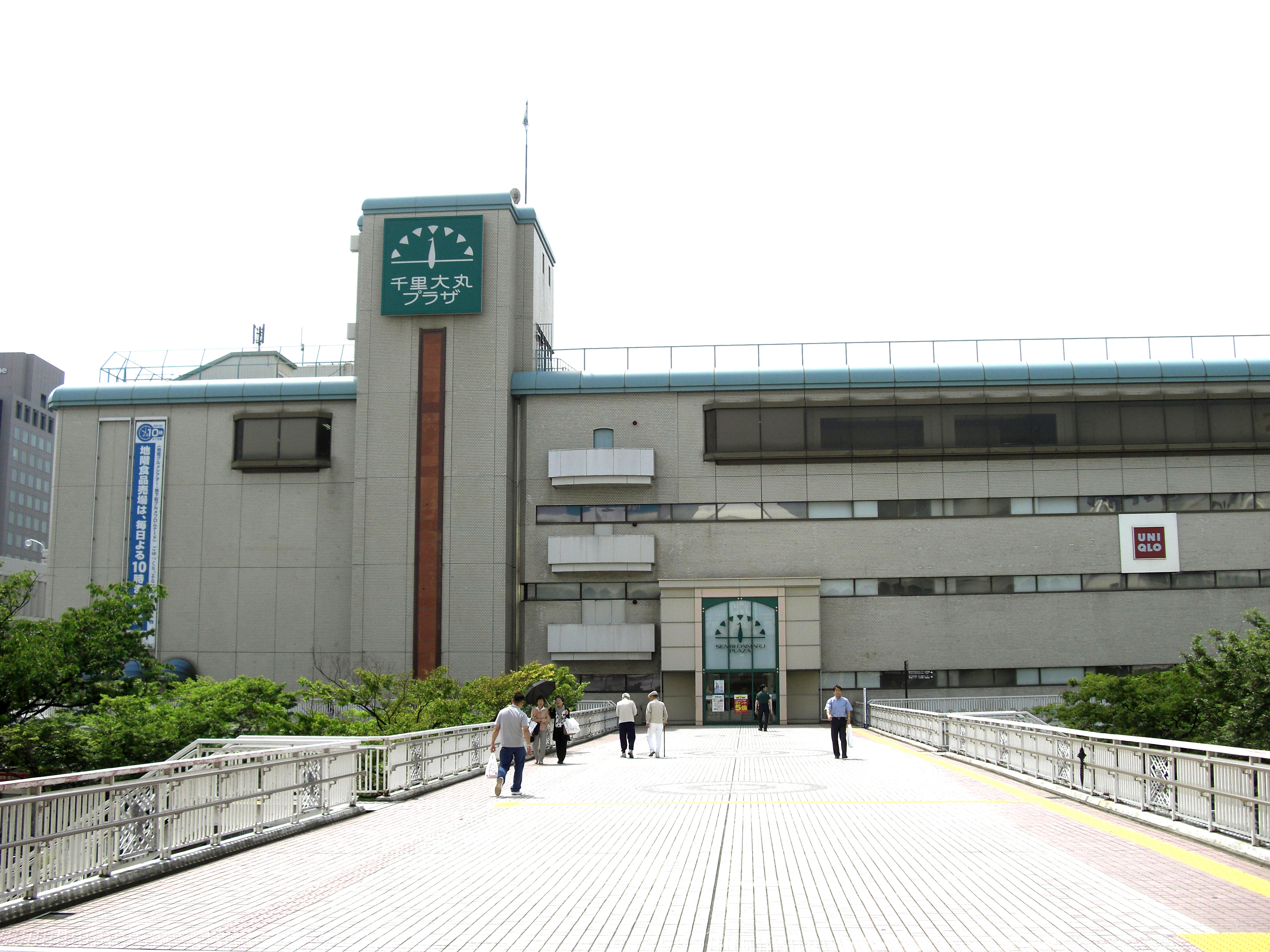 Senri Daimaru Plaza, 1-1-1 Shinsenrihigashimachi Toyonaka-City Osaka Japan.